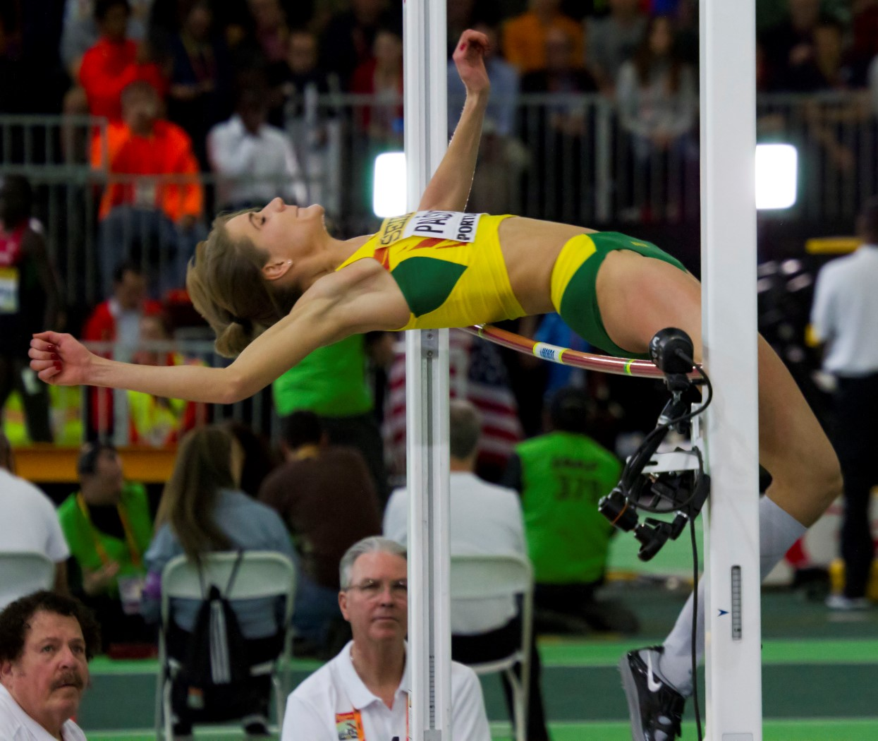 5060 palsyte